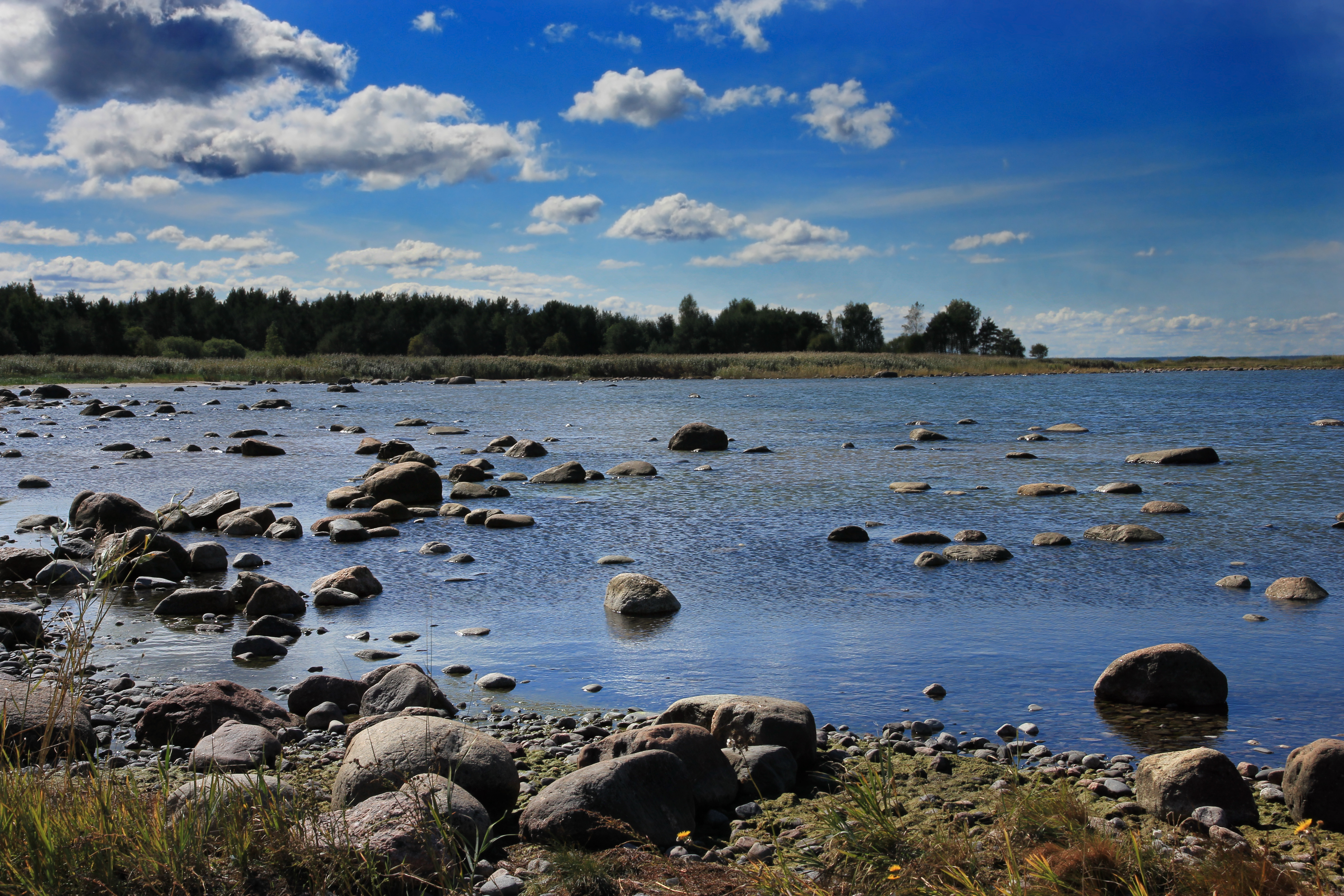 Pärispea neeme kivine rand